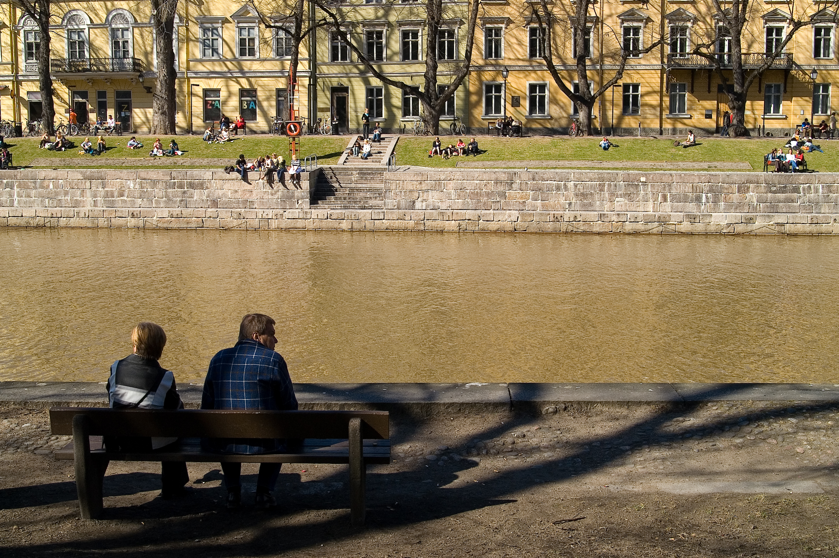 Kuva Aurajoen yli eteläpuolelta pohjoisepuolelle. Kuvan kortteli on Kauppiaskadun ja Aurakadun välissä.valossa ja varjossa